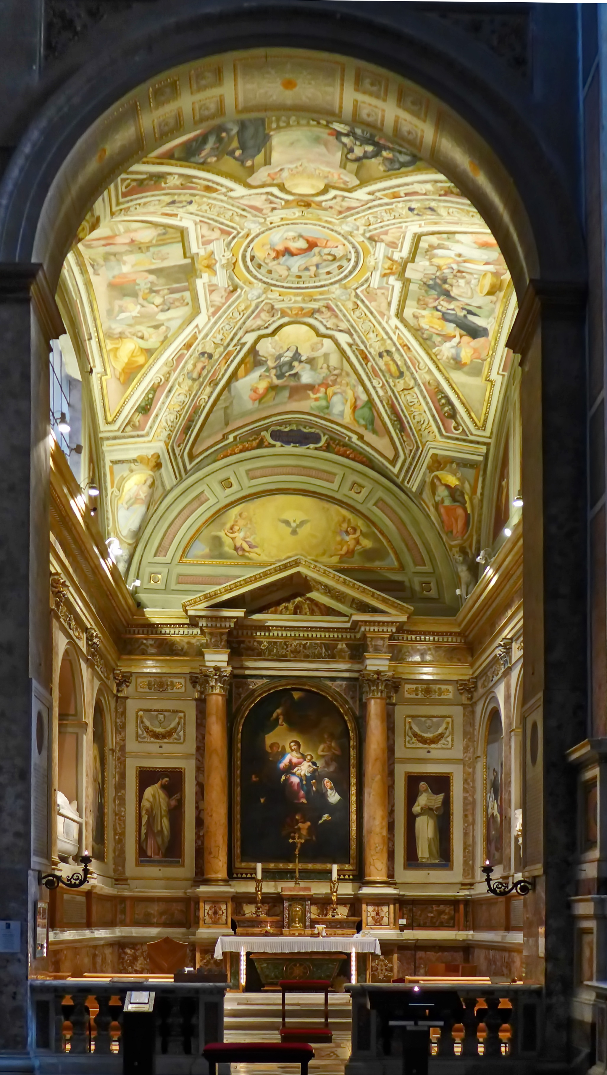 Sant'Agostino (Rom) Cappella Santa Monica